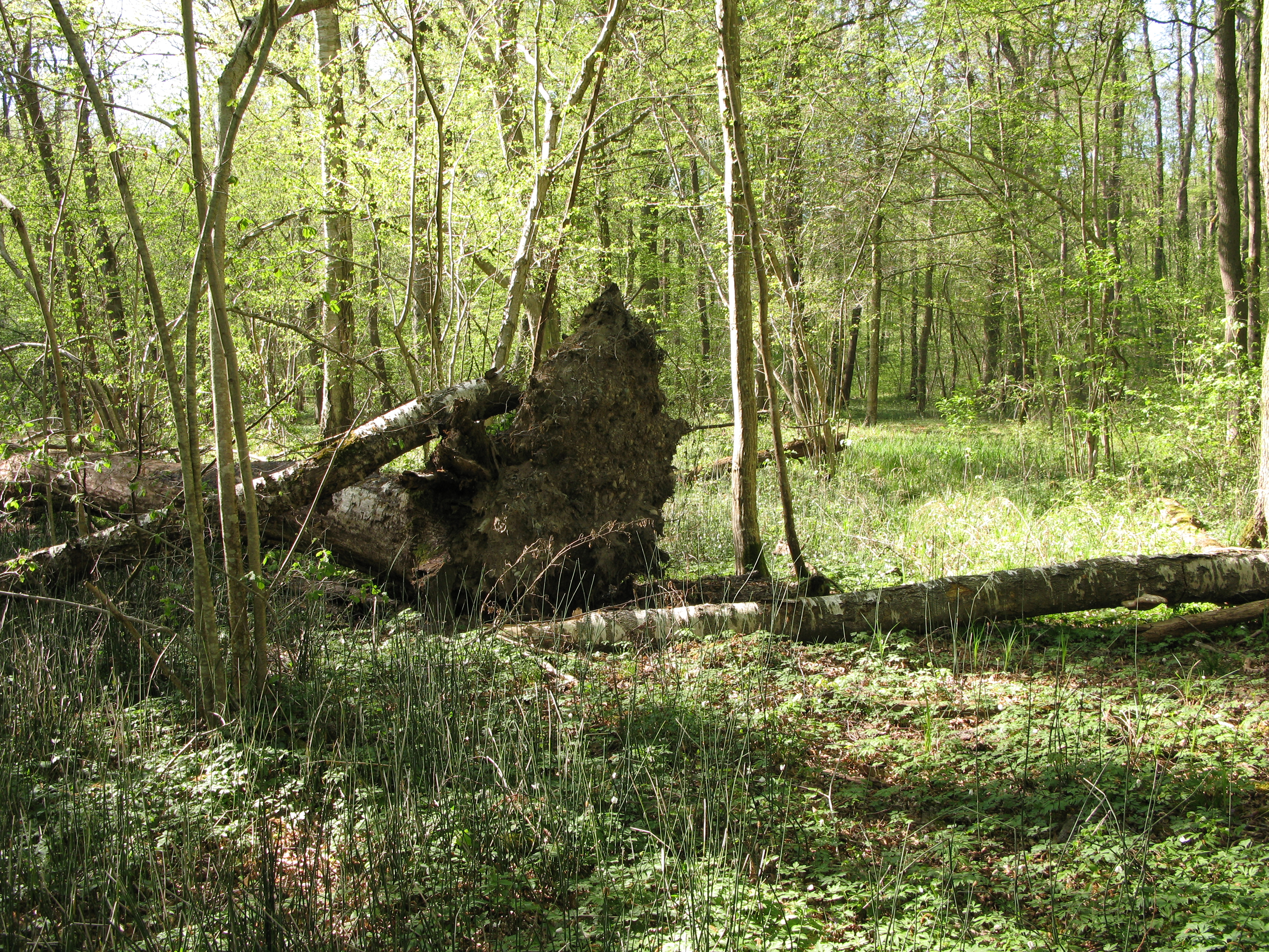 Im Naturschutzgebiet Gaisenmoos im Stadtkreis Freiburg im Breisgau in Baden-Württemberg.